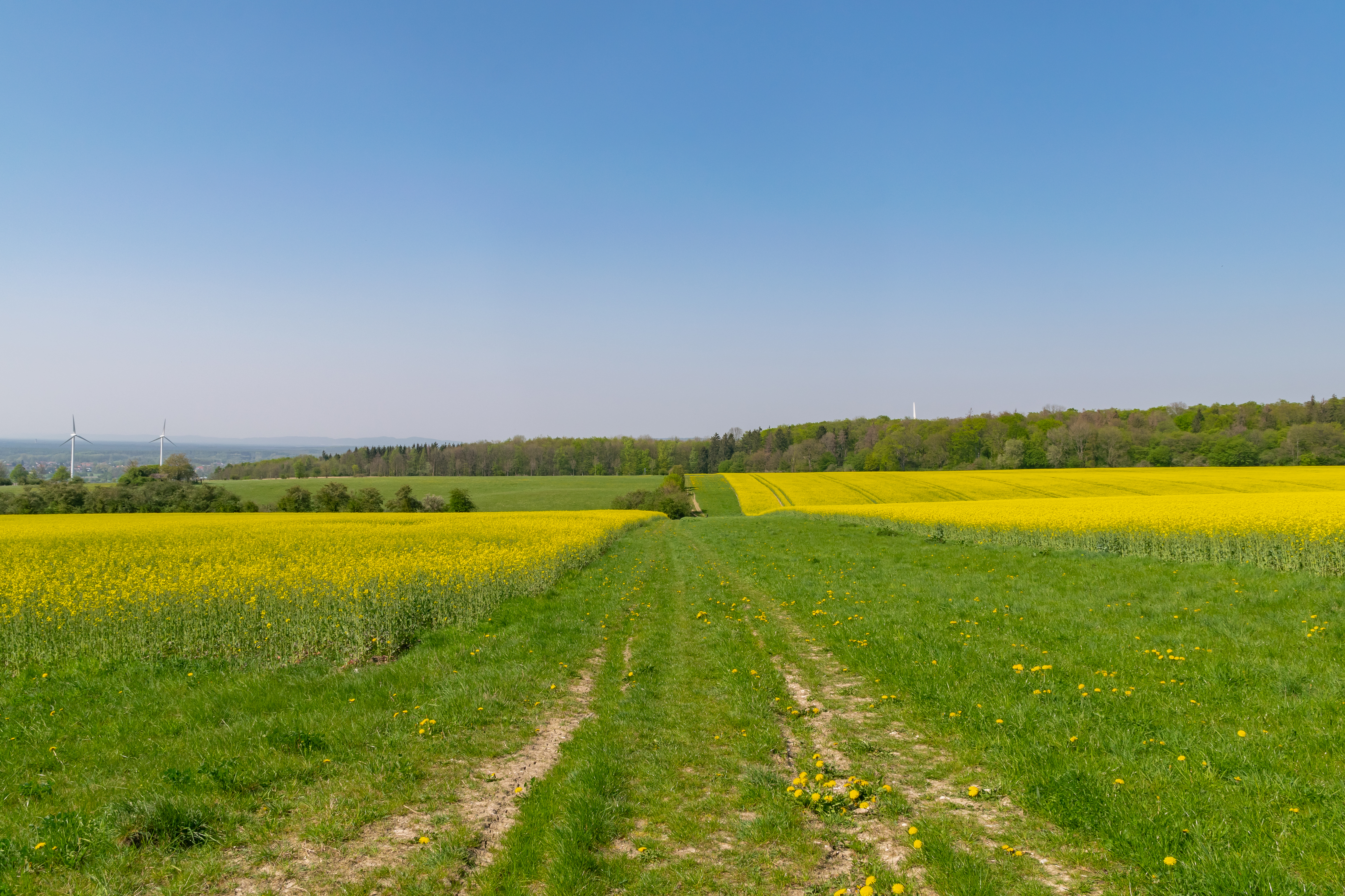 Landschaftsschutzgebiet "Offene Kulturlandschaft" östlich von Bad Lippspringe, Kreis Paderborn